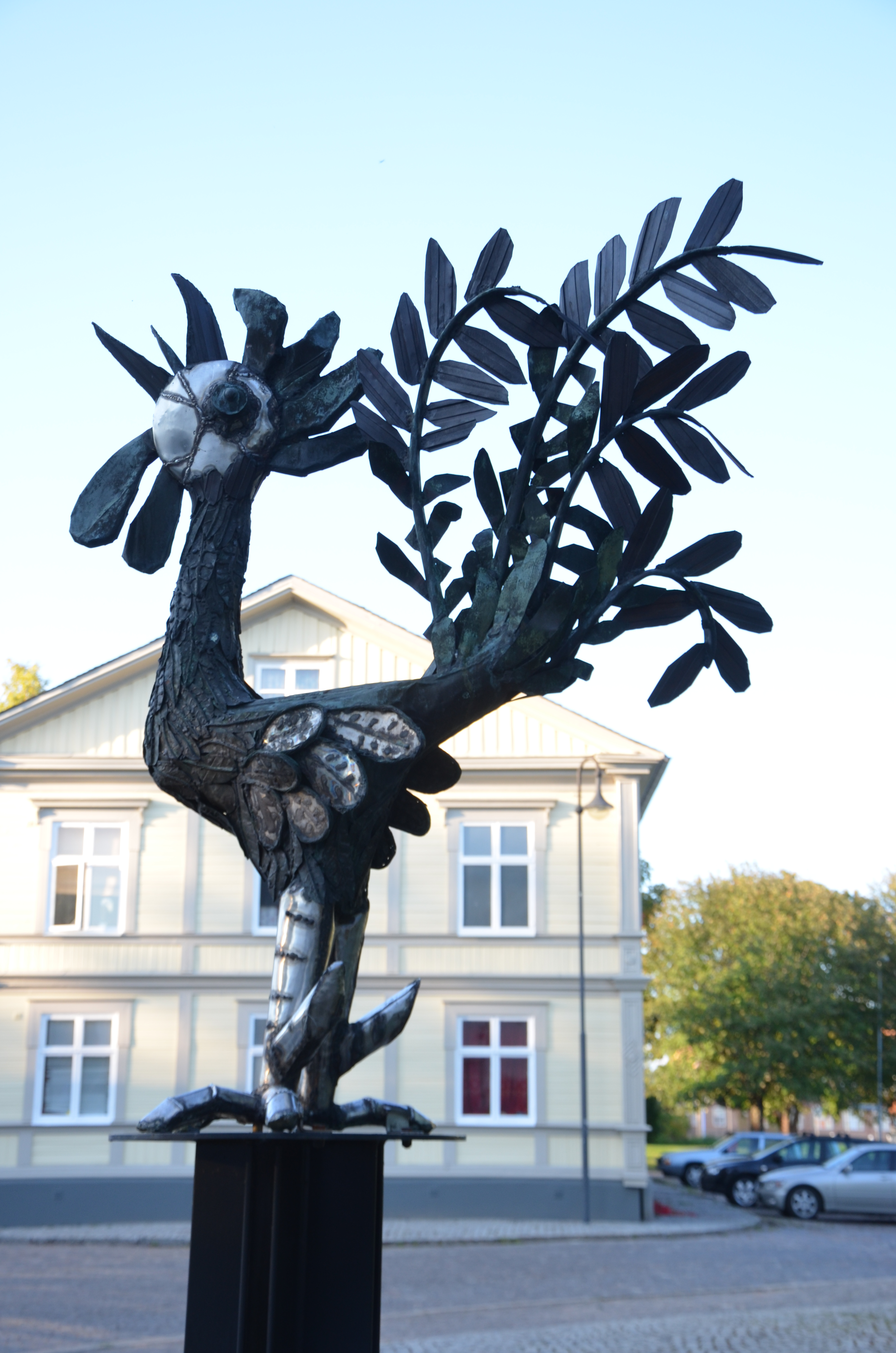 Kvarntuppen av Sivert Rapp, utanför Museet Kvarnen i Filipstad, plåt. Bilden tagen mot Hötorget.p